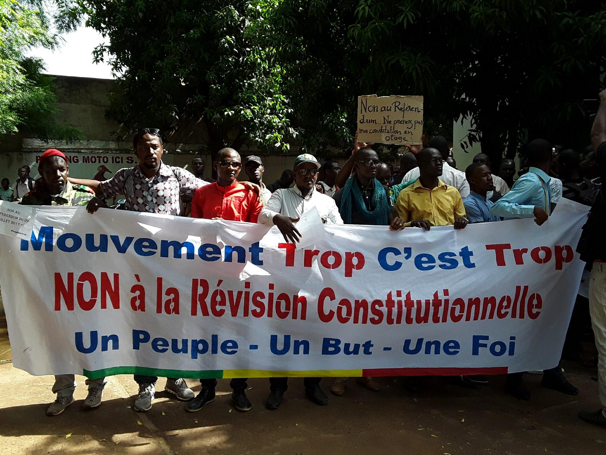 Mali : des blessés dans une marche de "Trop, c’est trop" dispersée par les forces de l’ordre. Les marcheurs voulaient protester contre la tenue du référendum constitutionnel du 9 juillet prochain. Les marcheurs bloqués à Bamako, le 8 juin 2017 (VOA/Kassim Traoré)